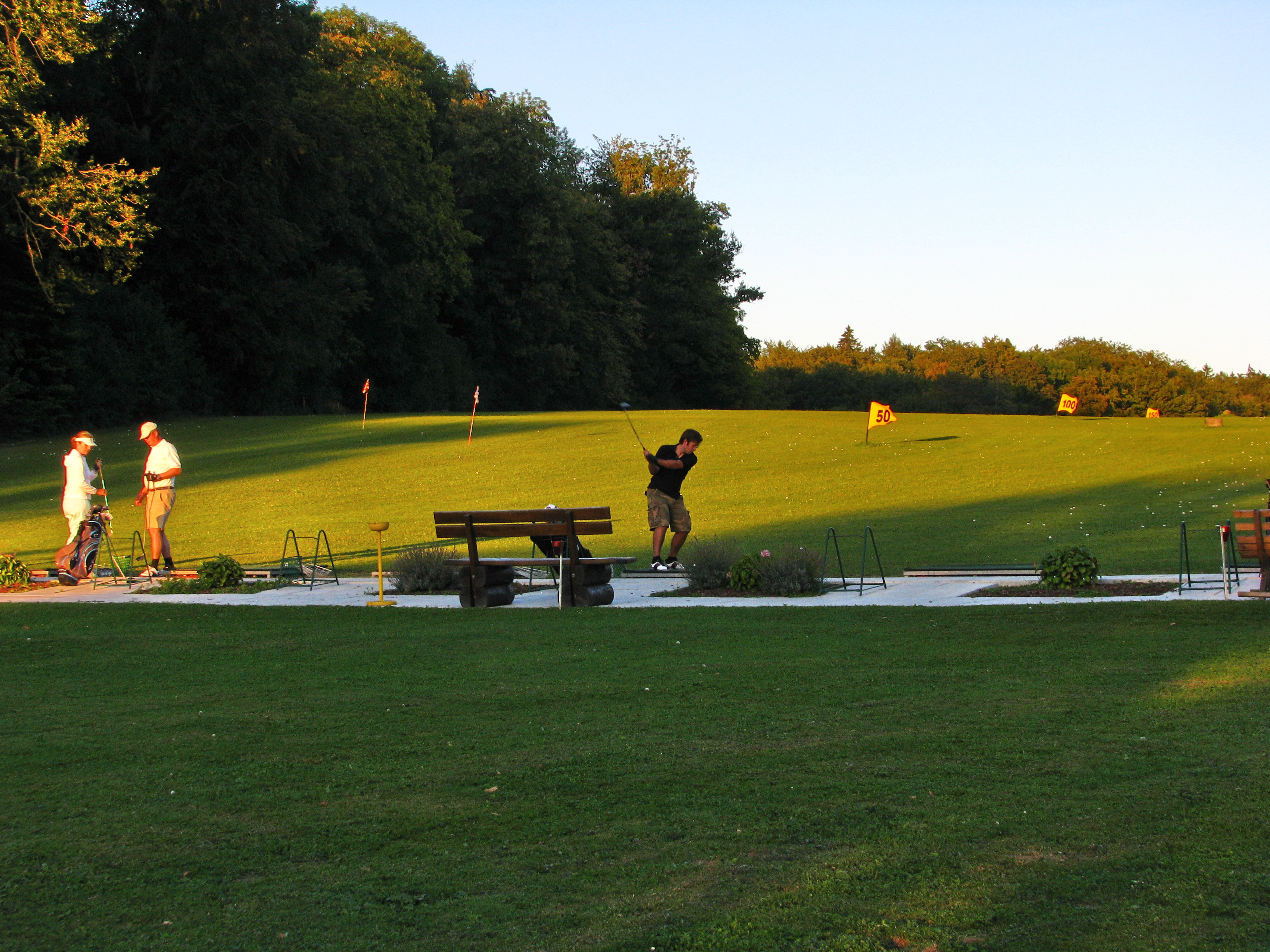 Dolder driving range on Adlisberg in Zürich (Switzerland)